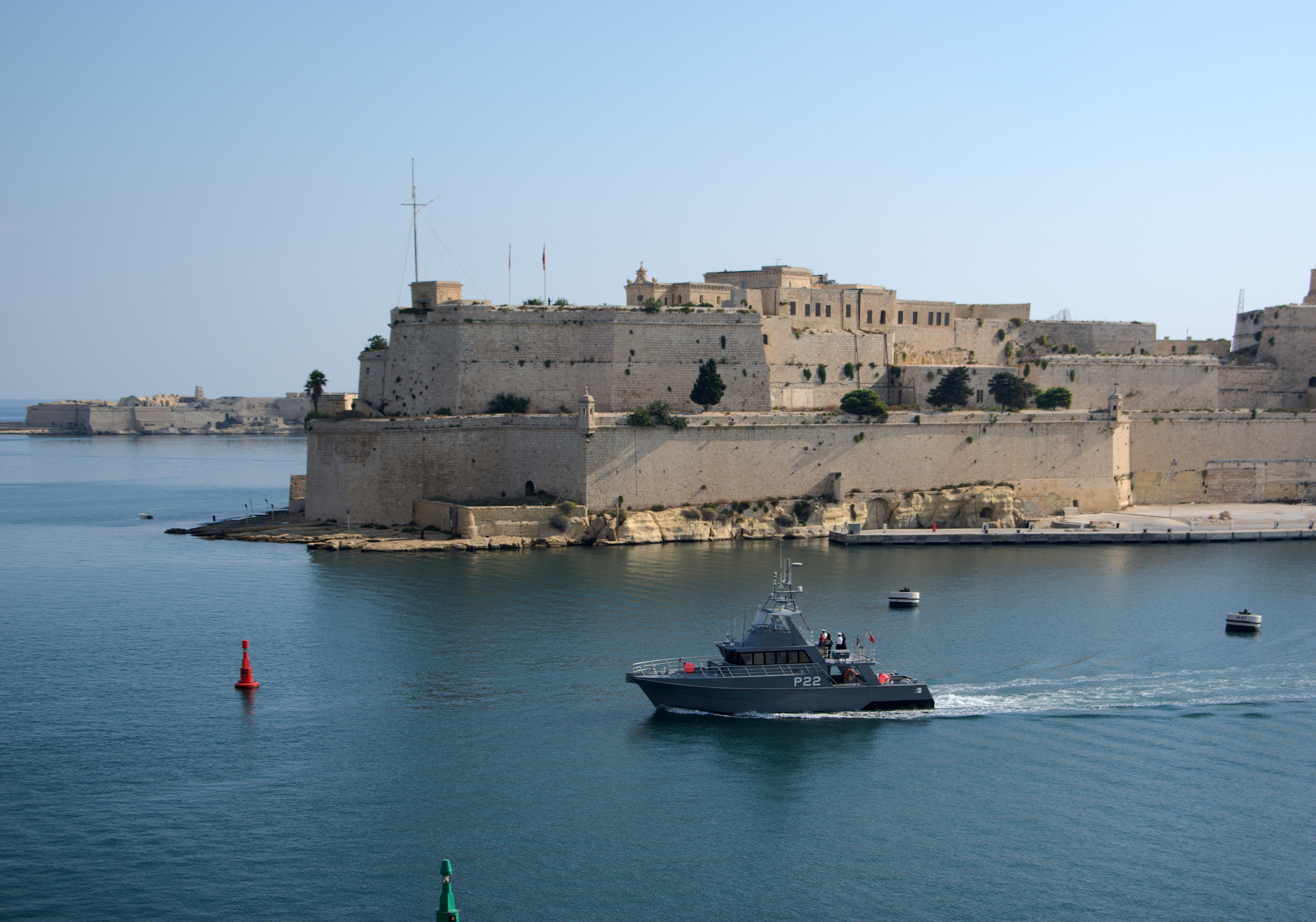 Malta, Fort St. Angelo